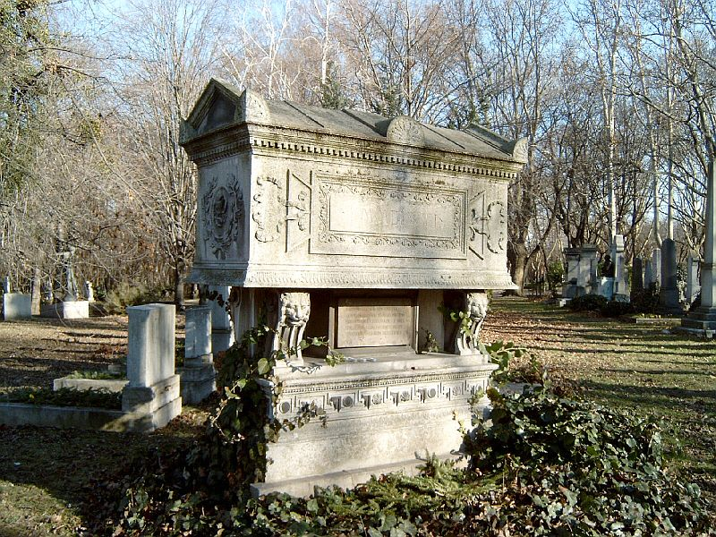 Semmelweis Ignác Fülöp sírja Budapesten. Kerepesi temető: 34/2-1-1. (Jelképes sír. 1930-tól 1963-ig ez volt Semmelweis negyedik "nyughelye".)